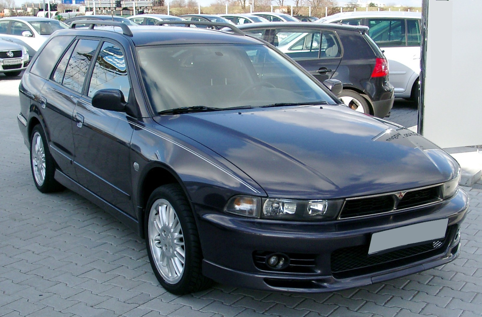 Mitsubishi Galant Kombi, 8. Generation